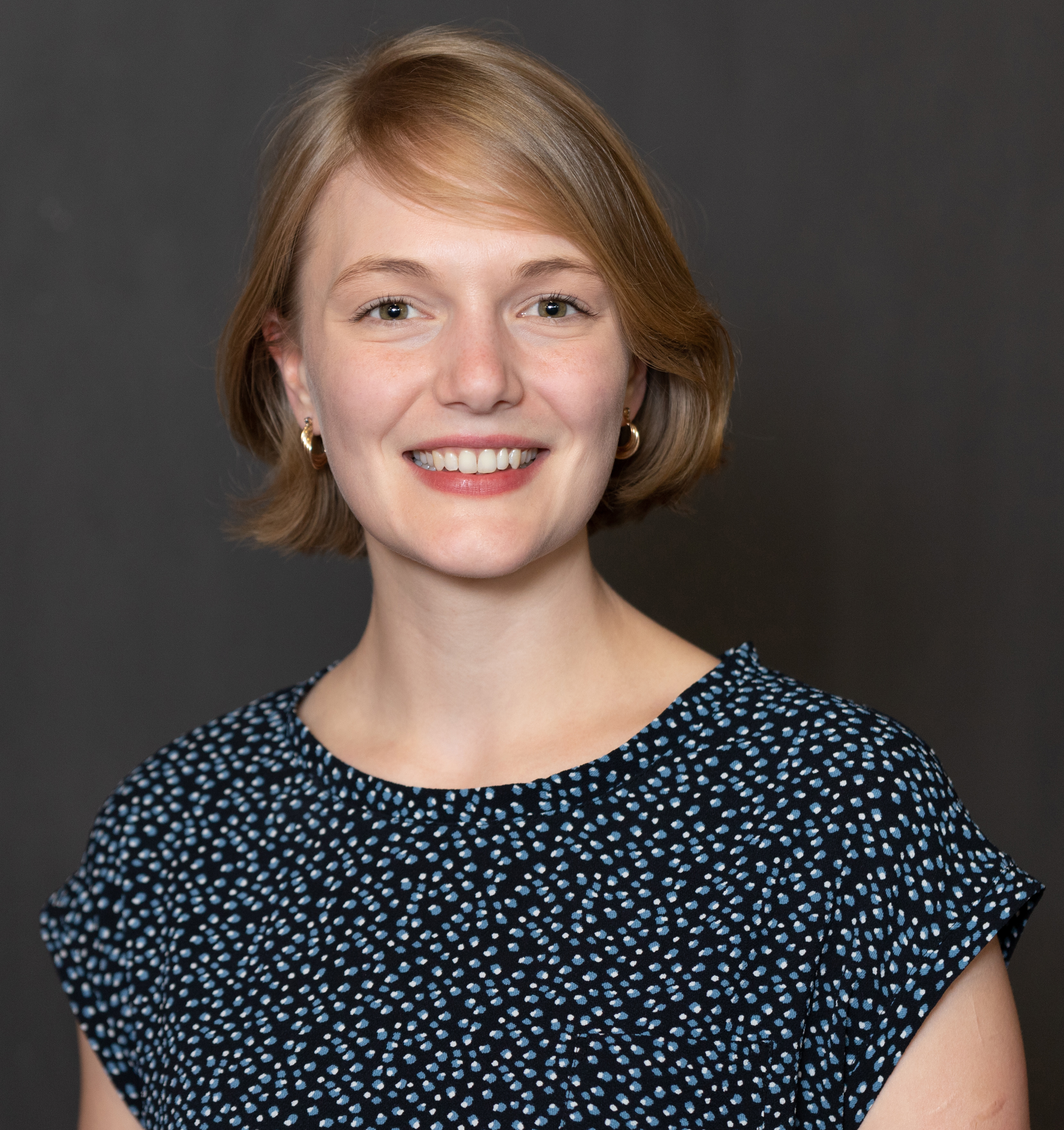 Ria Schröder, Bundesvorsitzende der Jungen Liberalen, auf dem 70. Ordentlichen Bundesparteitag der FDP.